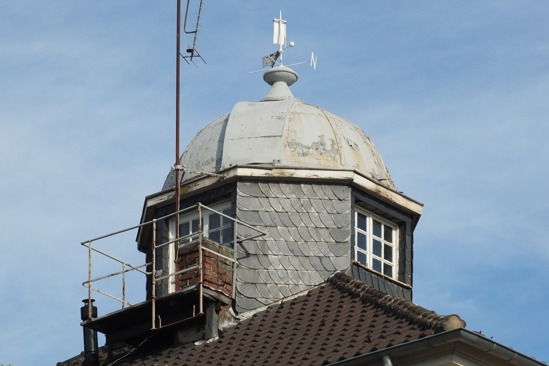 Höhere Privat-Knabenschule und Pensionat, Dach-Observatorium, Hilden, Kolpingstraße 9-11This is a photograph of an architectural monument.